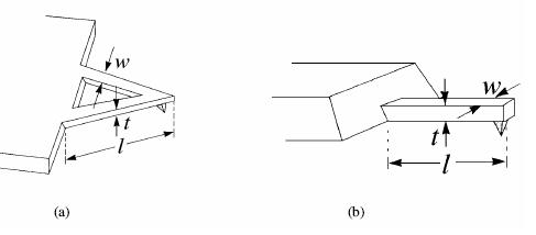 Jõusensorite erinevad kujud